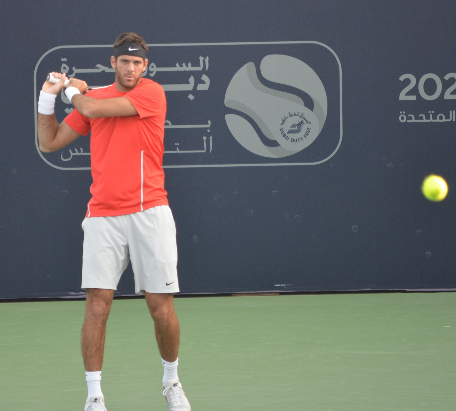 Dodig/Youzhny v del Potro and Stepanek